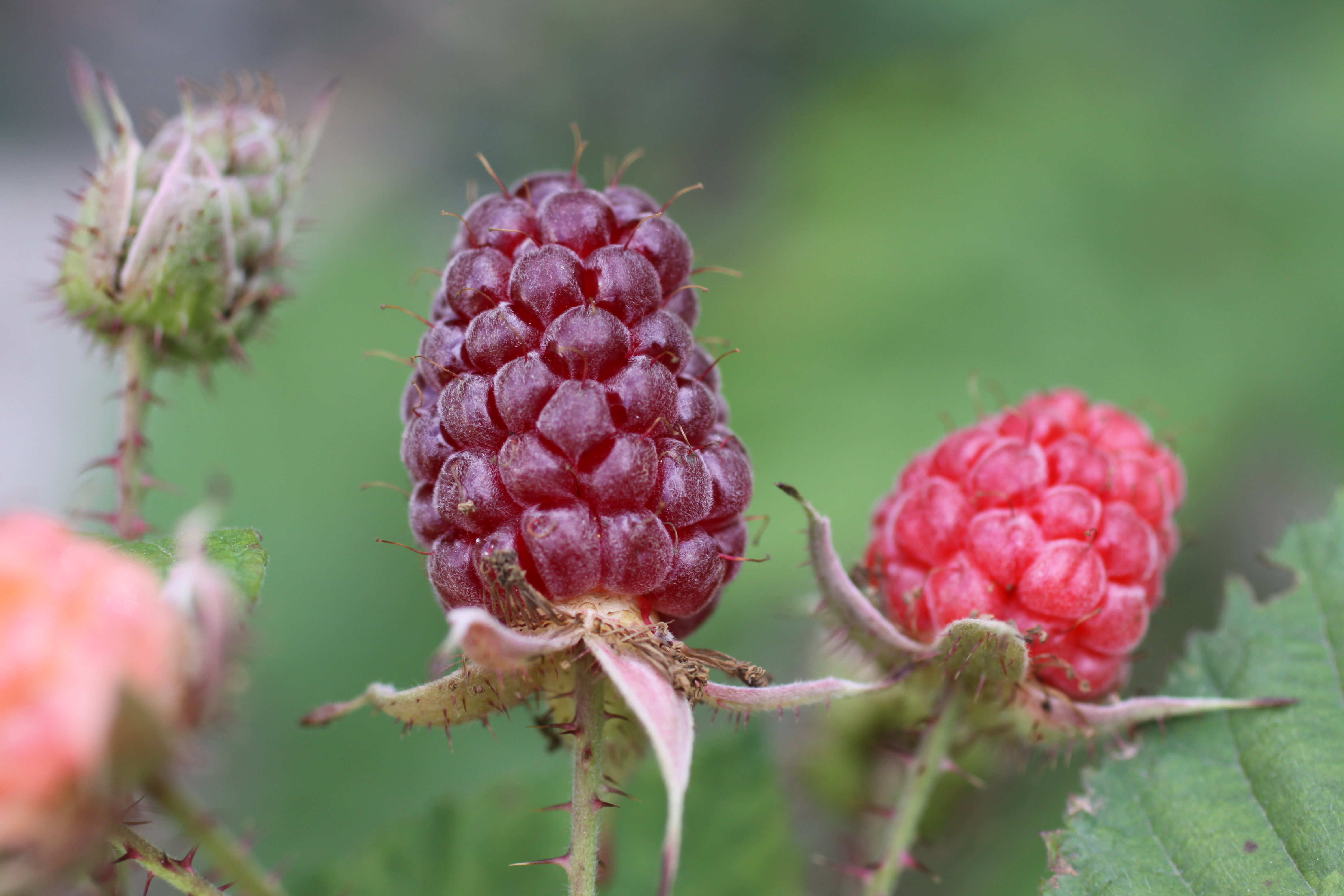 Deux framboises dont l' une est bien mure. Cette photographie a été prise dans un jardin à La Rochelle (France).